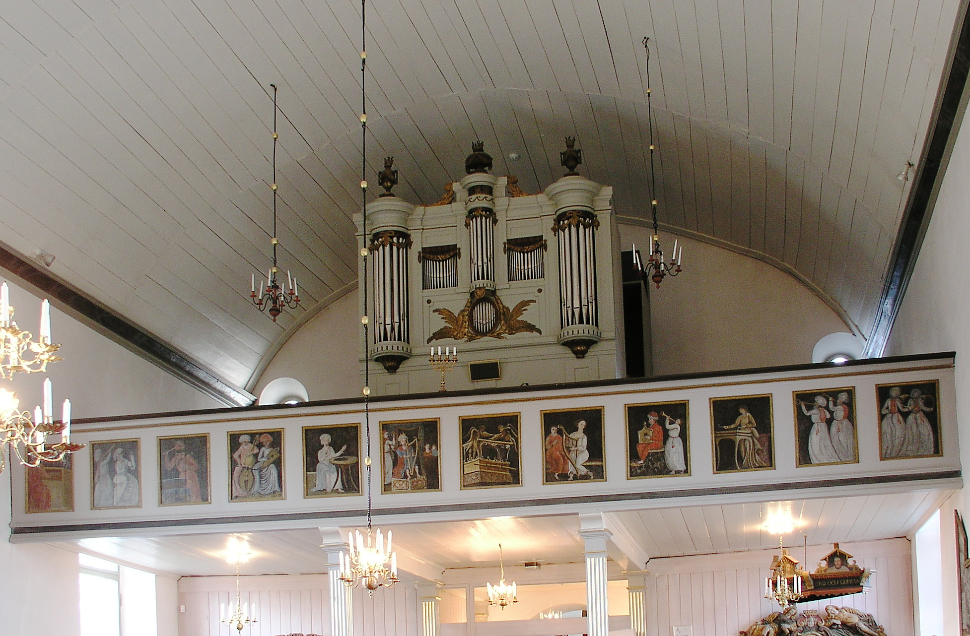 Rystad church, Diocese of Linköping, Linköpings kommun, Sweden